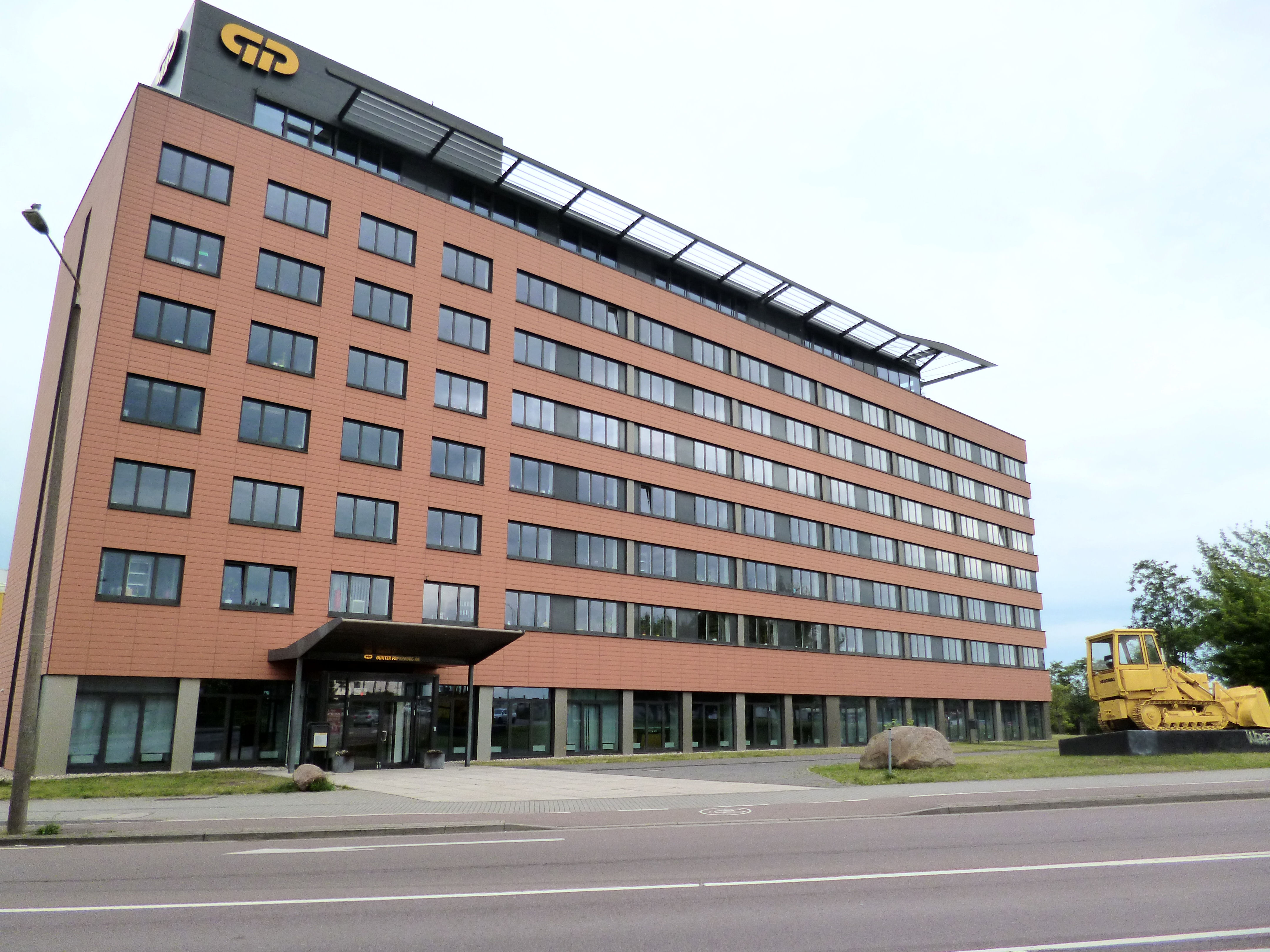 GP Günter Papenburg AG, Berliner Straße, Halle